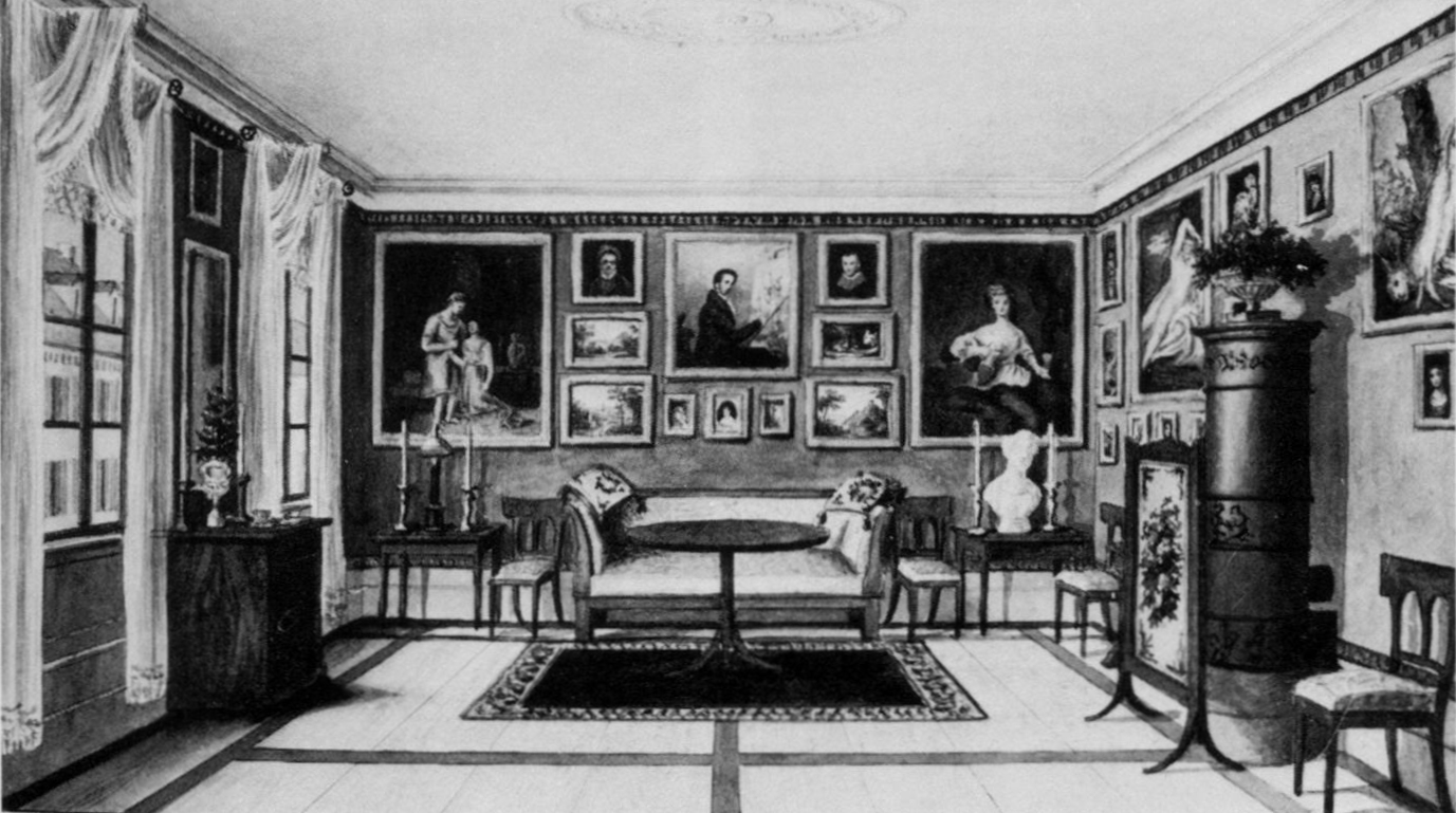 Salon im Hartmann-Reinbeckschen Haus in Stuttgart, Friedrichstraße 14, Aquarell von Mariette Zöppritz, undatiert, Privatbesitz, Foto: Stadtarchiv Stuttgart.